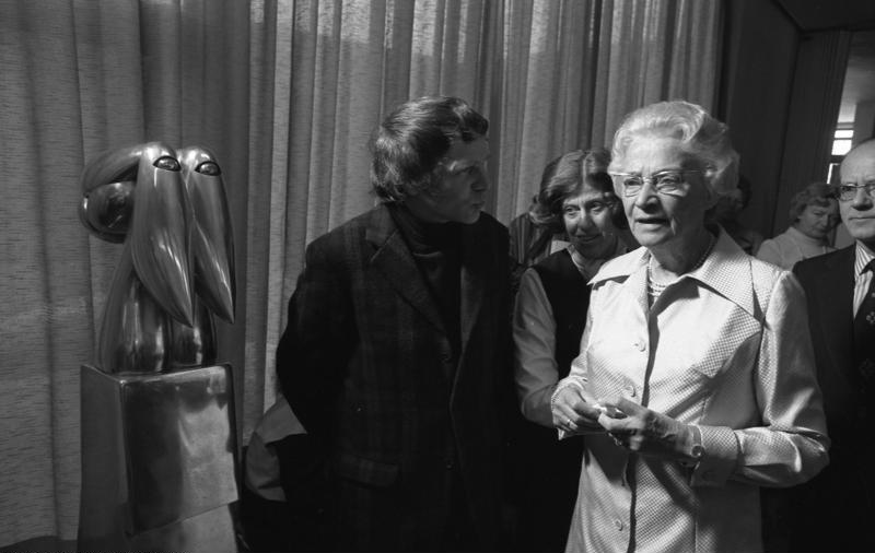 Frau Hilda Heinemann eröffnet die Ausstellung "Zeitgenössische Kunst im Hause des Bundespräsidenten" - Querschnitt durch alle bisherigen Ausstellungen - in der Beethovenhalle, Bonn